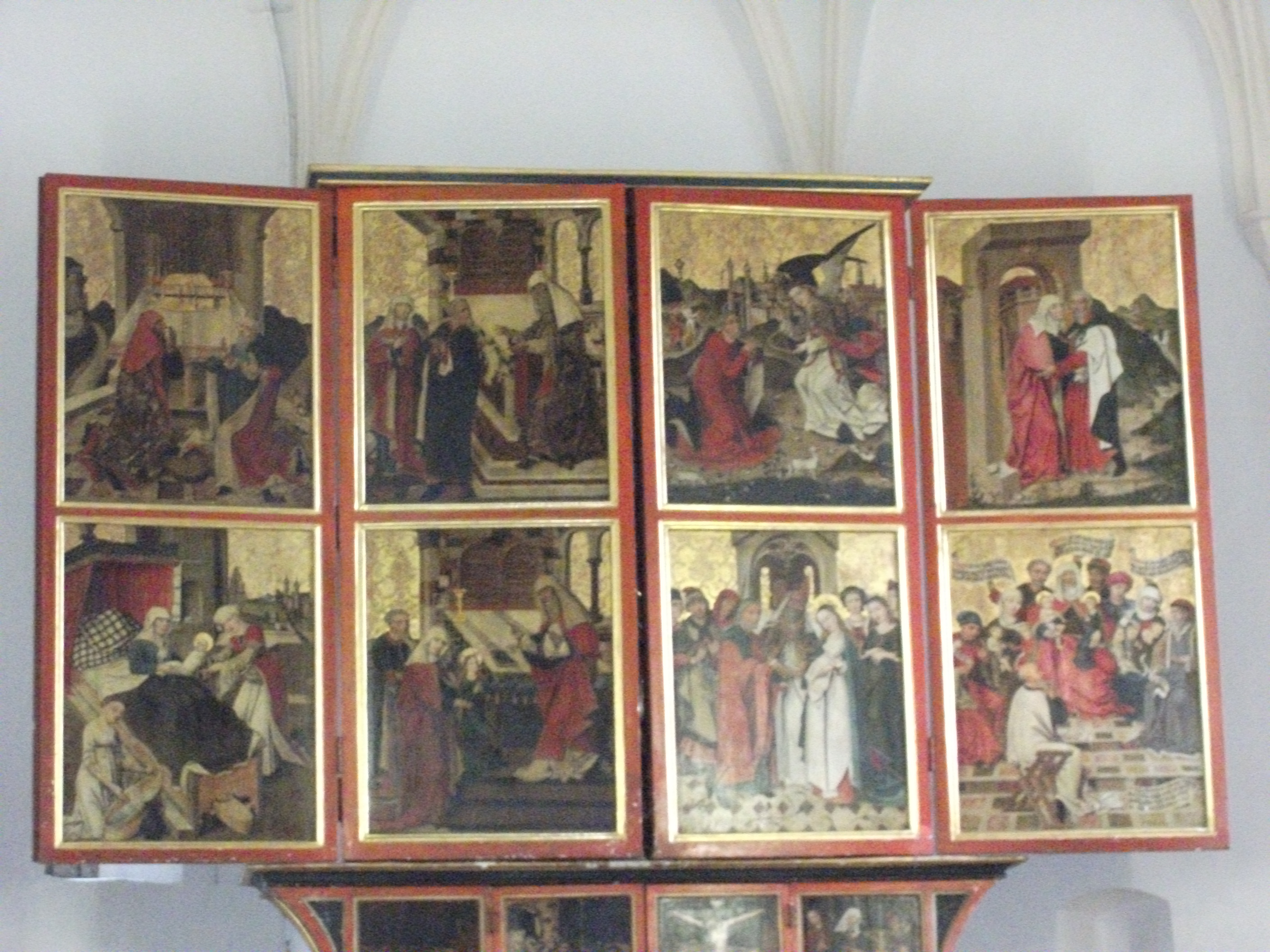 Altar von 1492, geschlossen